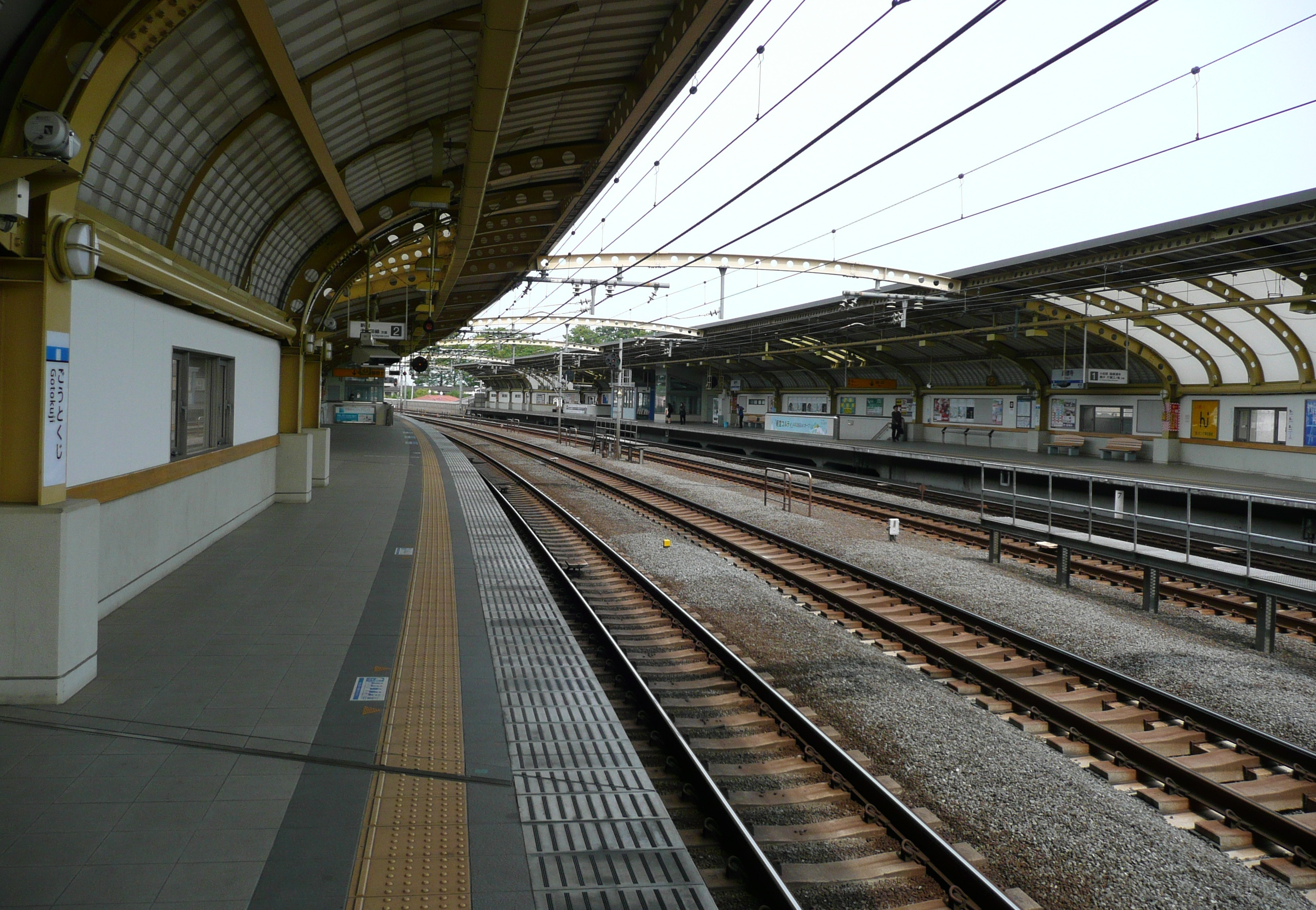 豪徳寺駅ホーム